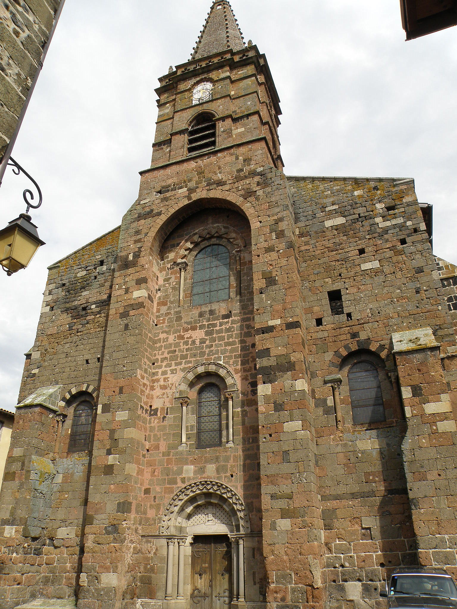 Saint-Paulien, dép. de la Haute-Loire, France (Auvergne). Église paroissiale Saint-Georges, façade occidentale.